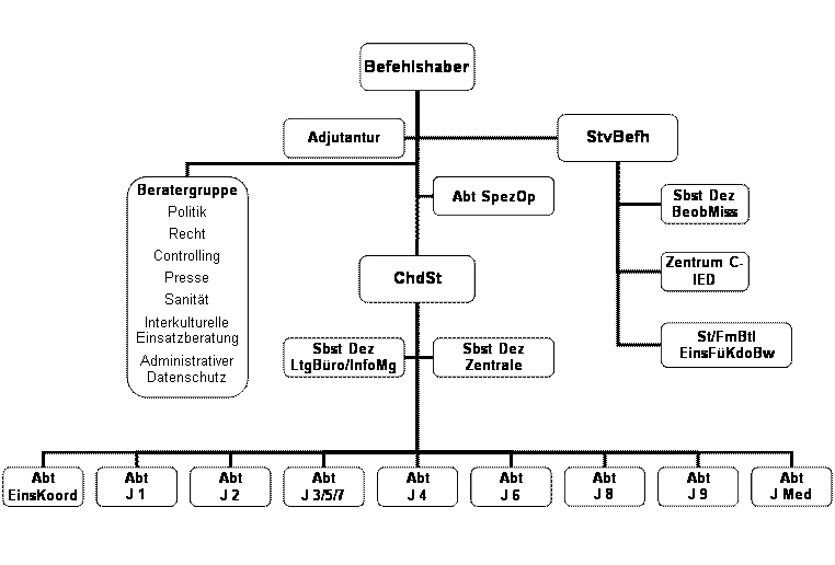 Aufstellung des Einsatzführungskommando der Bundeswehr